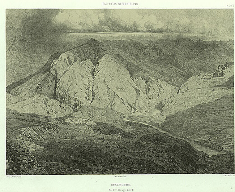 Daghestan septentrional. Ountzoukoul.